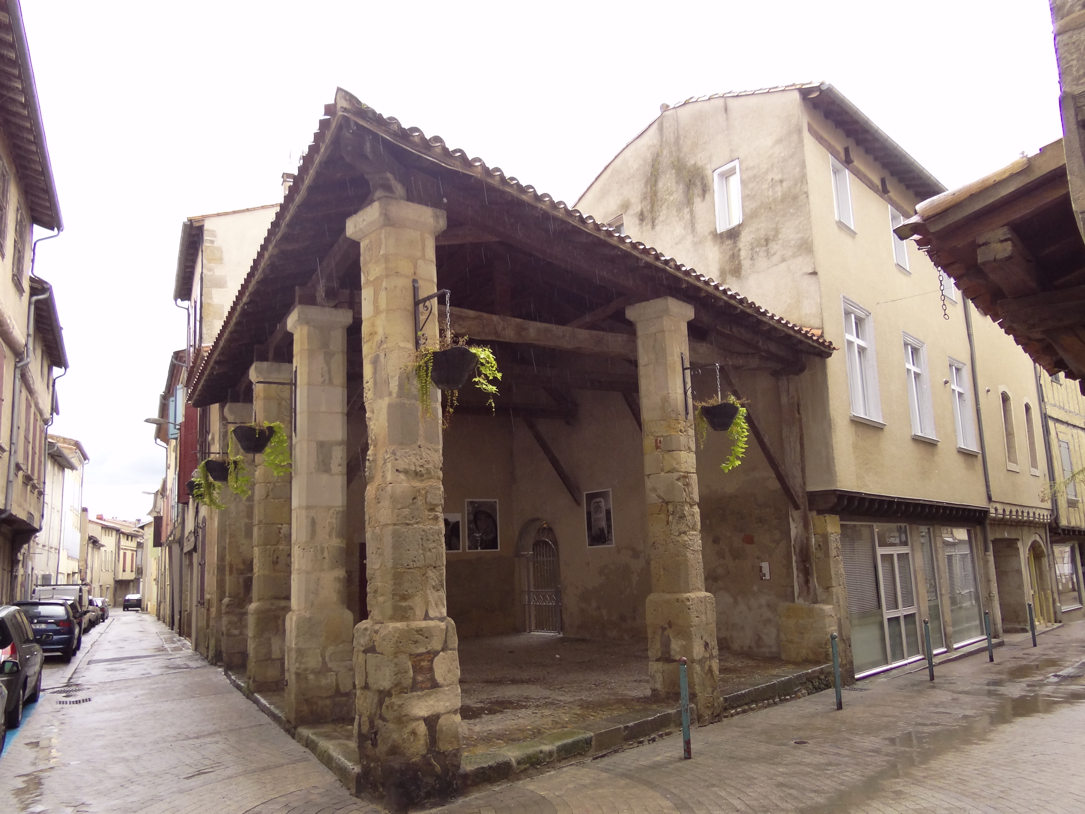 Halle de Labruguière (Classé) .